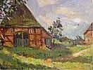 Bauernkate in Schleswig-Holstein Öl auf Malkarton, zweifach signiert. 18,5 cm x 22,5 cm, gerahmt